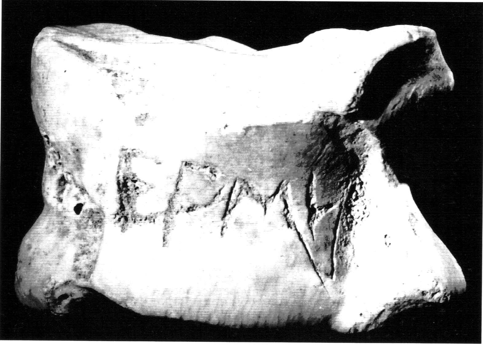 אסטרגל עם הכתובת הרמס במצד שער העמקים